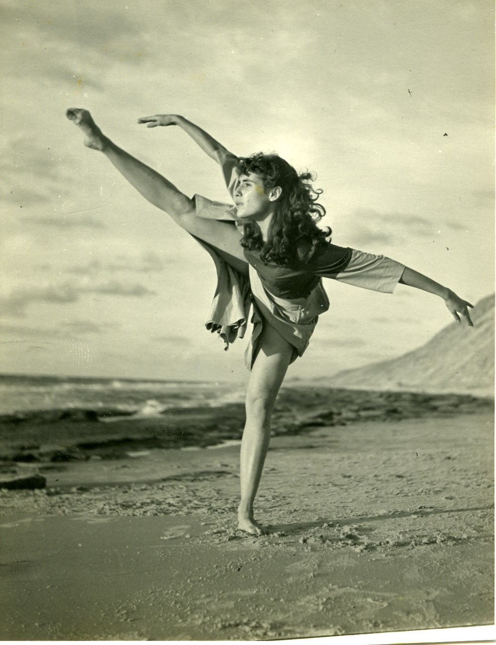 רינה שחם "אש בהרים" 1951